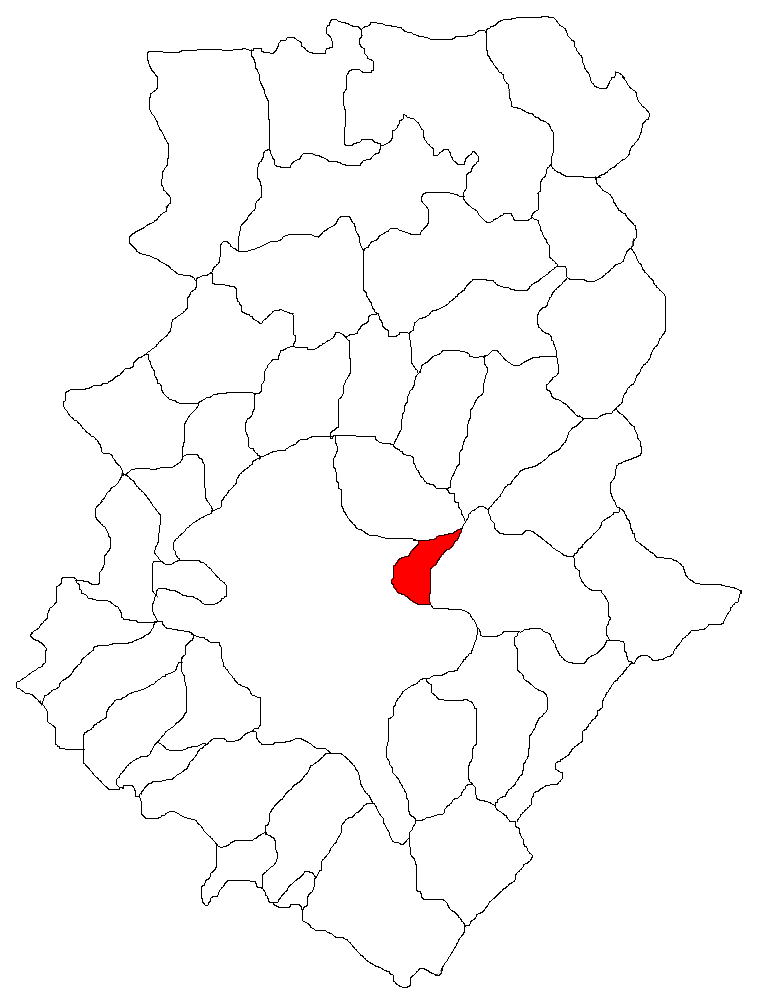 Categorie:Hărţi ale judeţului Ilfov